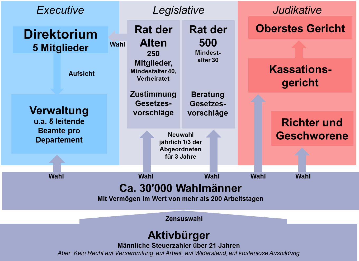 Direktoriumsverfassung der Französischen Repulik, beschlossen vom Nationalkonvent am 22. August 1795